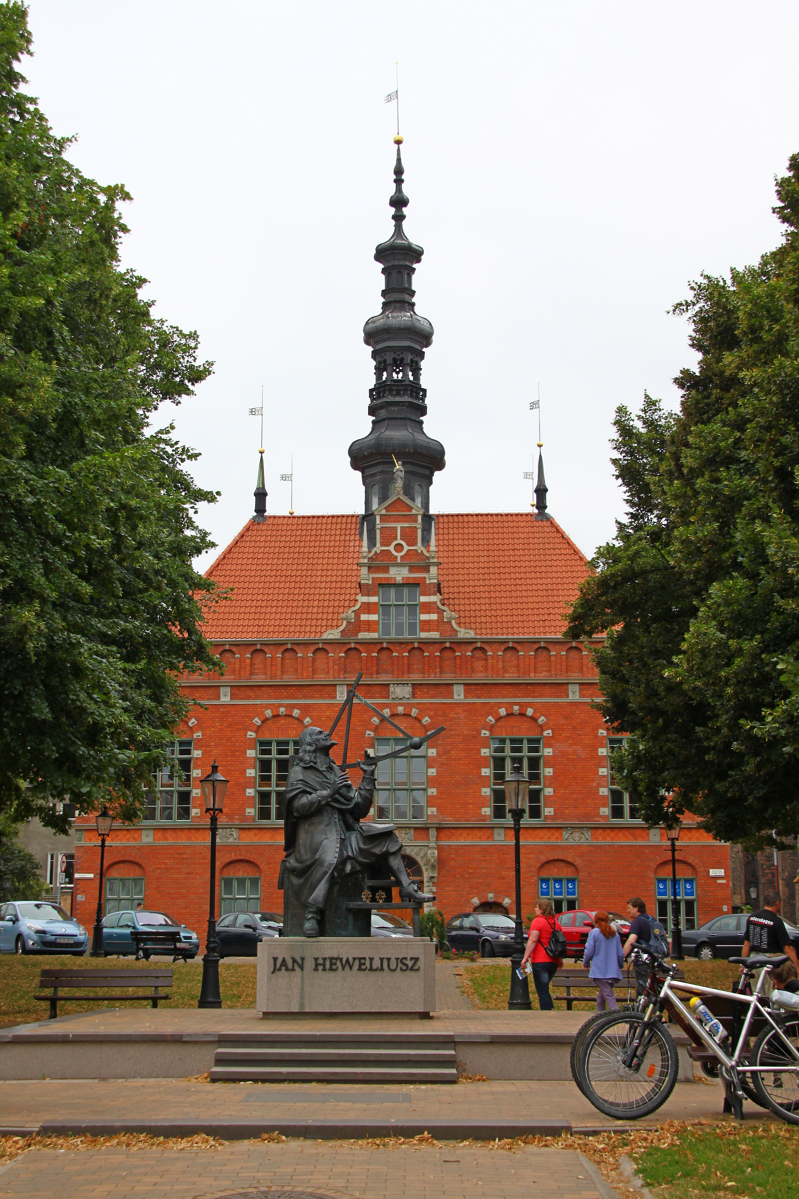 Gdańsk, ratusz staromiejski, ob. Woj. Ośrodek Kultury, 1587-1589